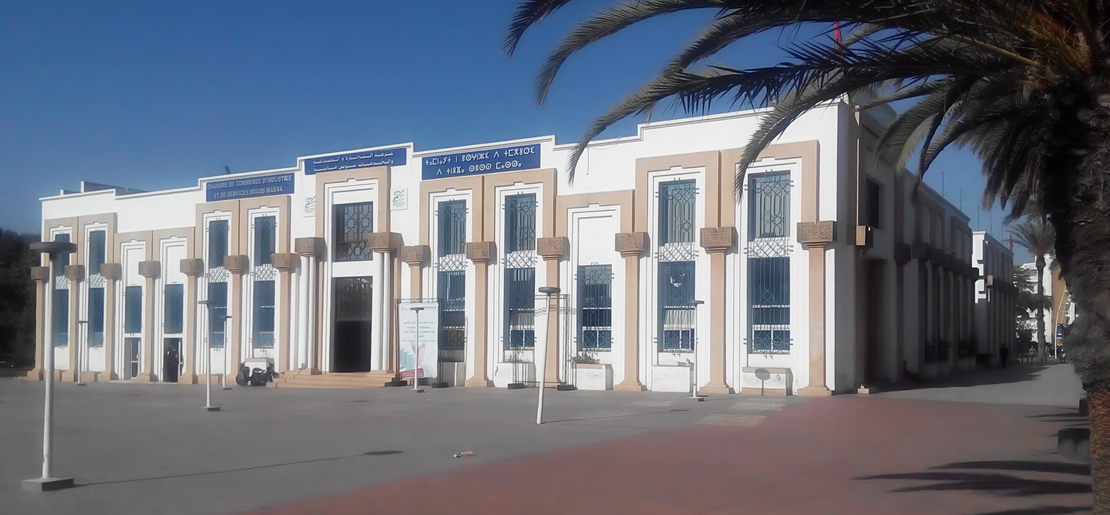 Agadir (2017), Handelkammer unter Palmen